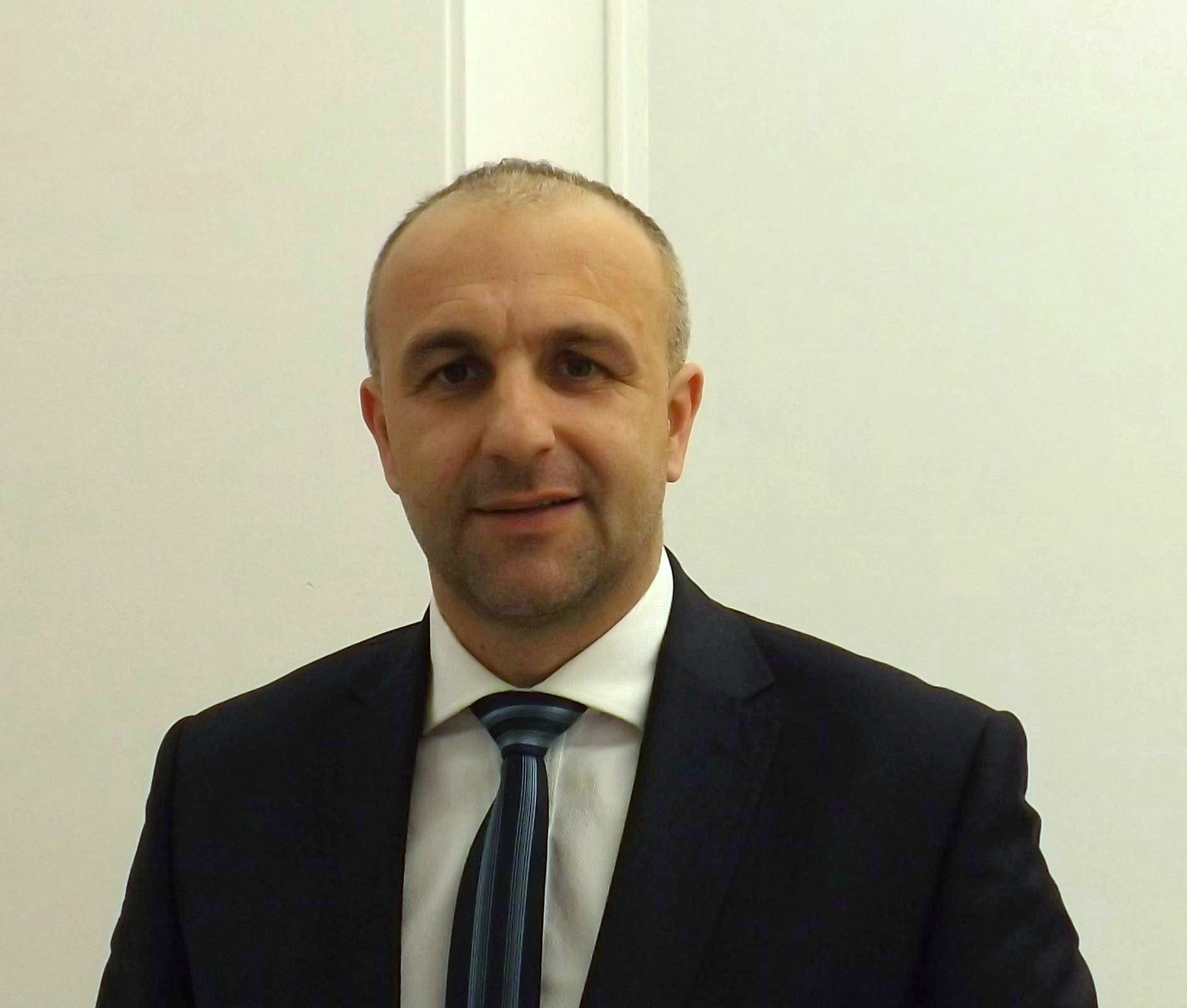 Wojciech Penkalski, poseł Twojego Ruchu